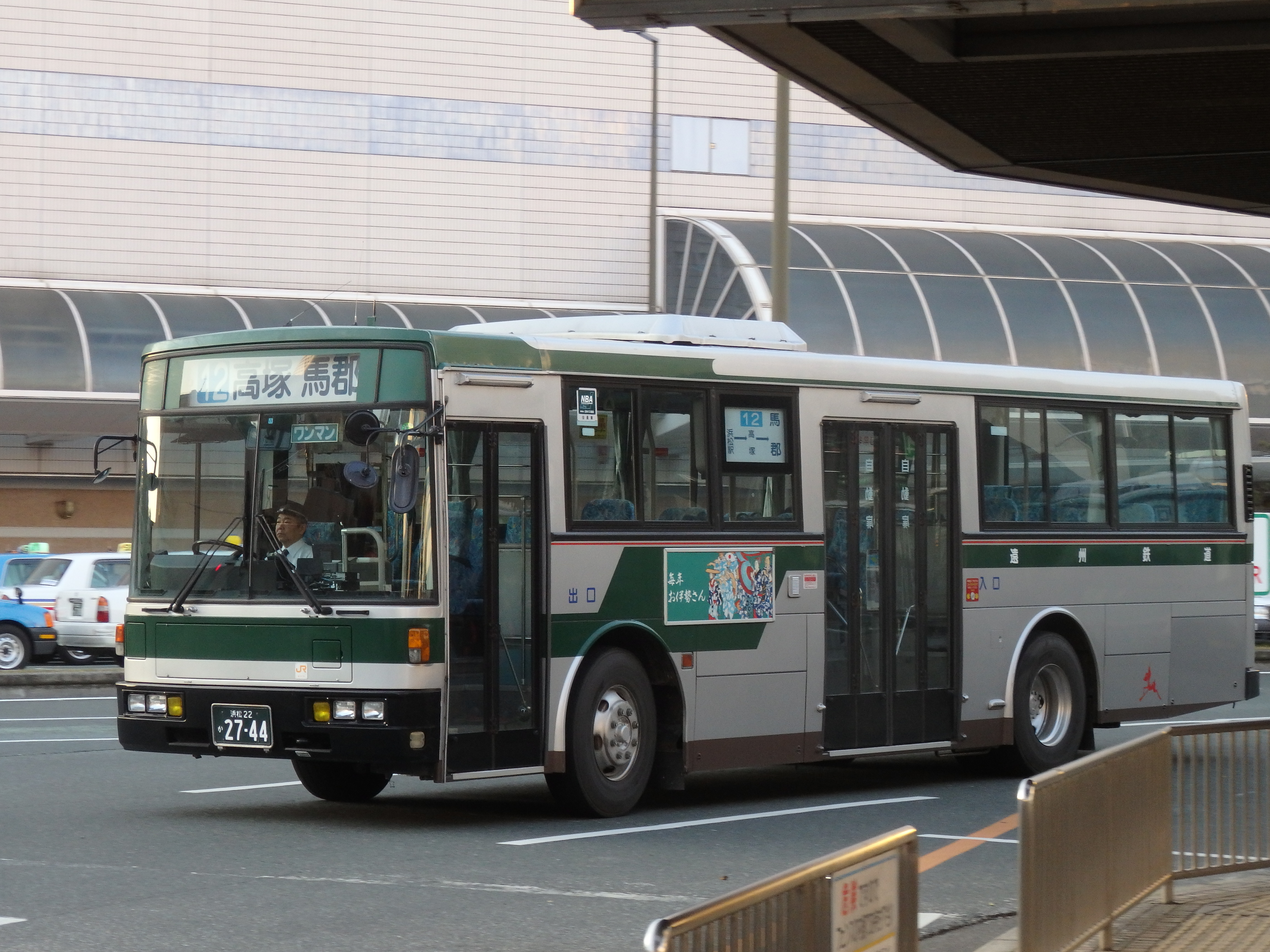 遠州鉄道の日野・ブルーリボン7E架装車